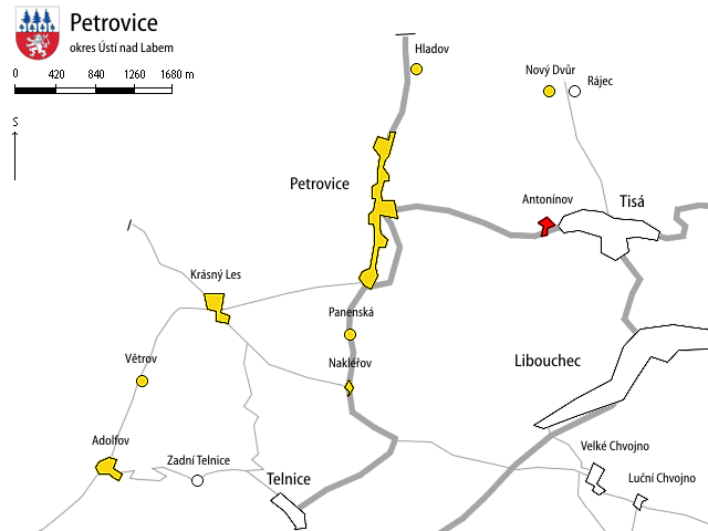 Oblast Petrovice